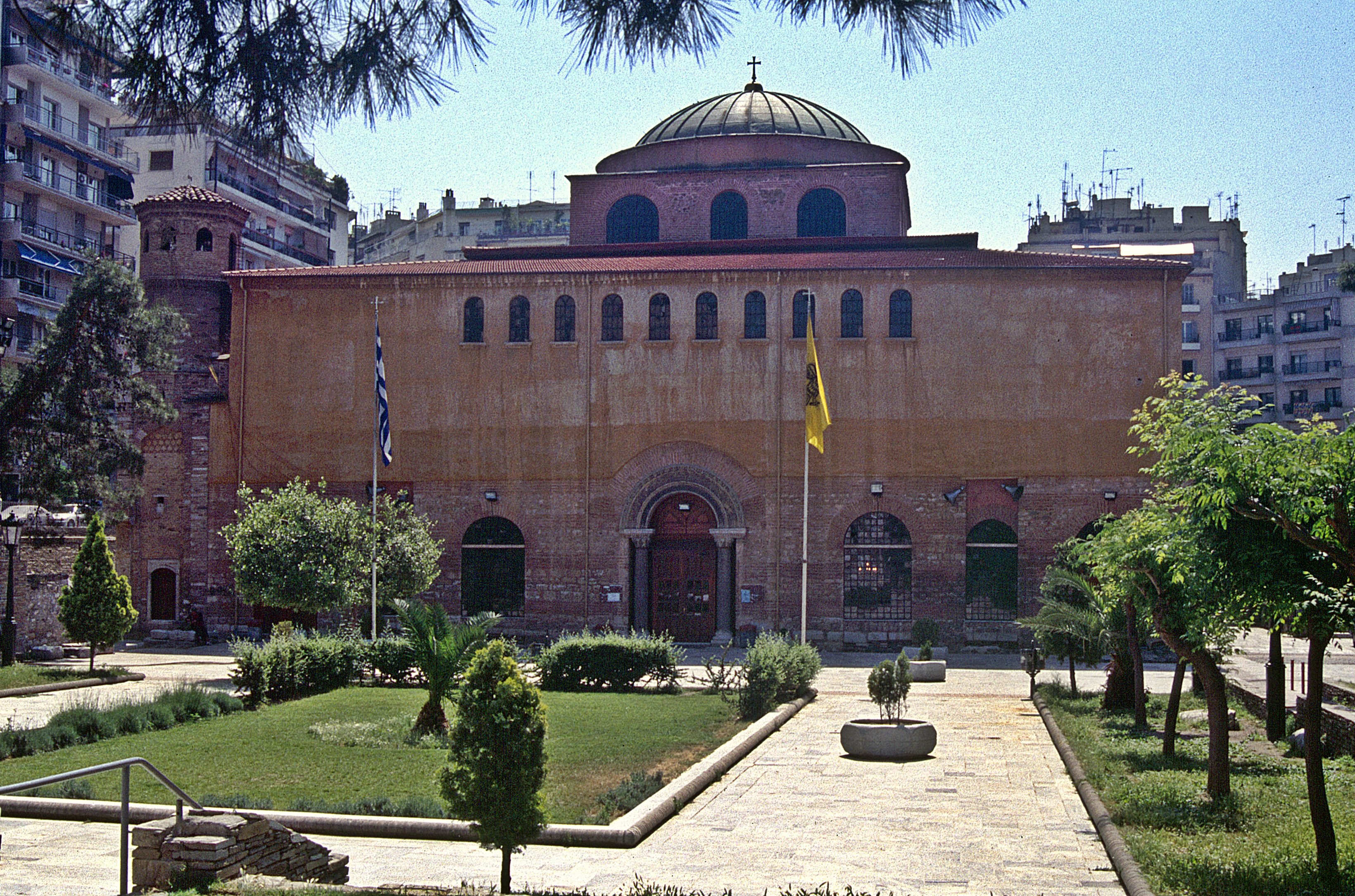 Thessaloniki: Hagia Sophia